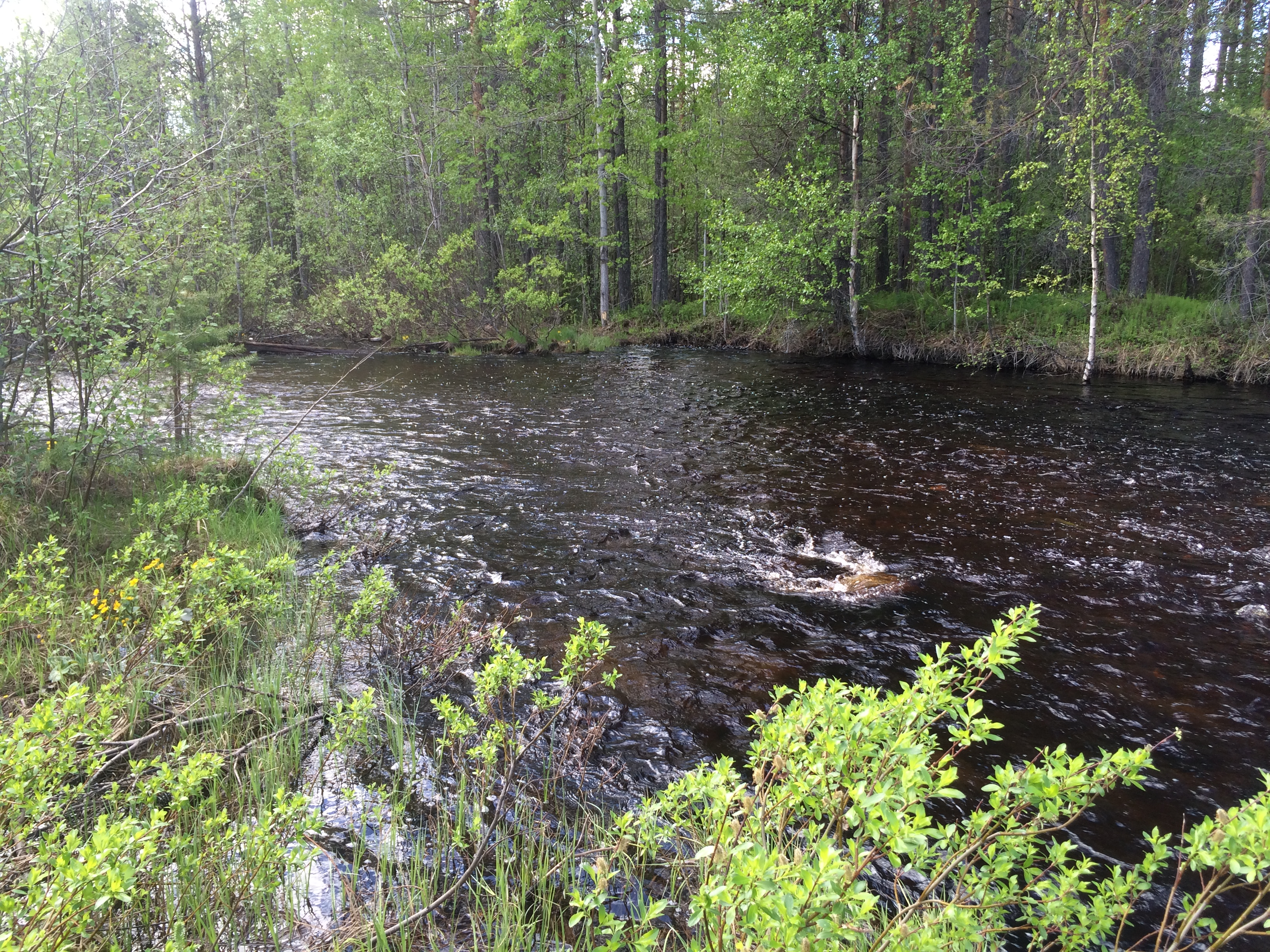 руч. Тулинец 2